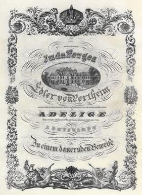 Seite aus dem Adelsdiplom von Ferdinand I. (Kaiser von Österreich, 1793-1875) für Juda Leopold Porges, Großindustriellen in Prag (1785–1869), mit Verleihung des Prädikates "Edler von Portheim", Wien, 5. Juli 1841. Eigenhändige Unterschrift des Kaisers, Gegenzeichnung Graf Anton Friedrich Mittrowsky, Graf Karl Inzaghi, Freiherr Franz v. Pillerstorff und Graf Kasimir Lanckoronski. Pergamentlibell, 11 Seiten, kalligraphiert von Graf Ferdinand Tattenbach (am Ende signiert "Ferdinand Graf Tattenbach scripsit 1841"). Die ersten drei Seiten des Diploms sind gedruckt, teils goldgehöhte Schrift, gedruckte Bordüren, fünf Vignetten mit handgezeichneten Ansichten (Palais, Fabriken), qualitätvolle Wappendarstellung in floraler Goldbordüre, überhöht von österreichischer Kaiserkrone. Dunkelroter Samteinband mit Blindprägungen und goldgeprägter Doppeladlerdarstellung, Seidenmoirespiegel mit reichen goldgeprägten Bordüren und Doppeladler, schwarz-gelbe Schließbänder. Siegel fehlt.